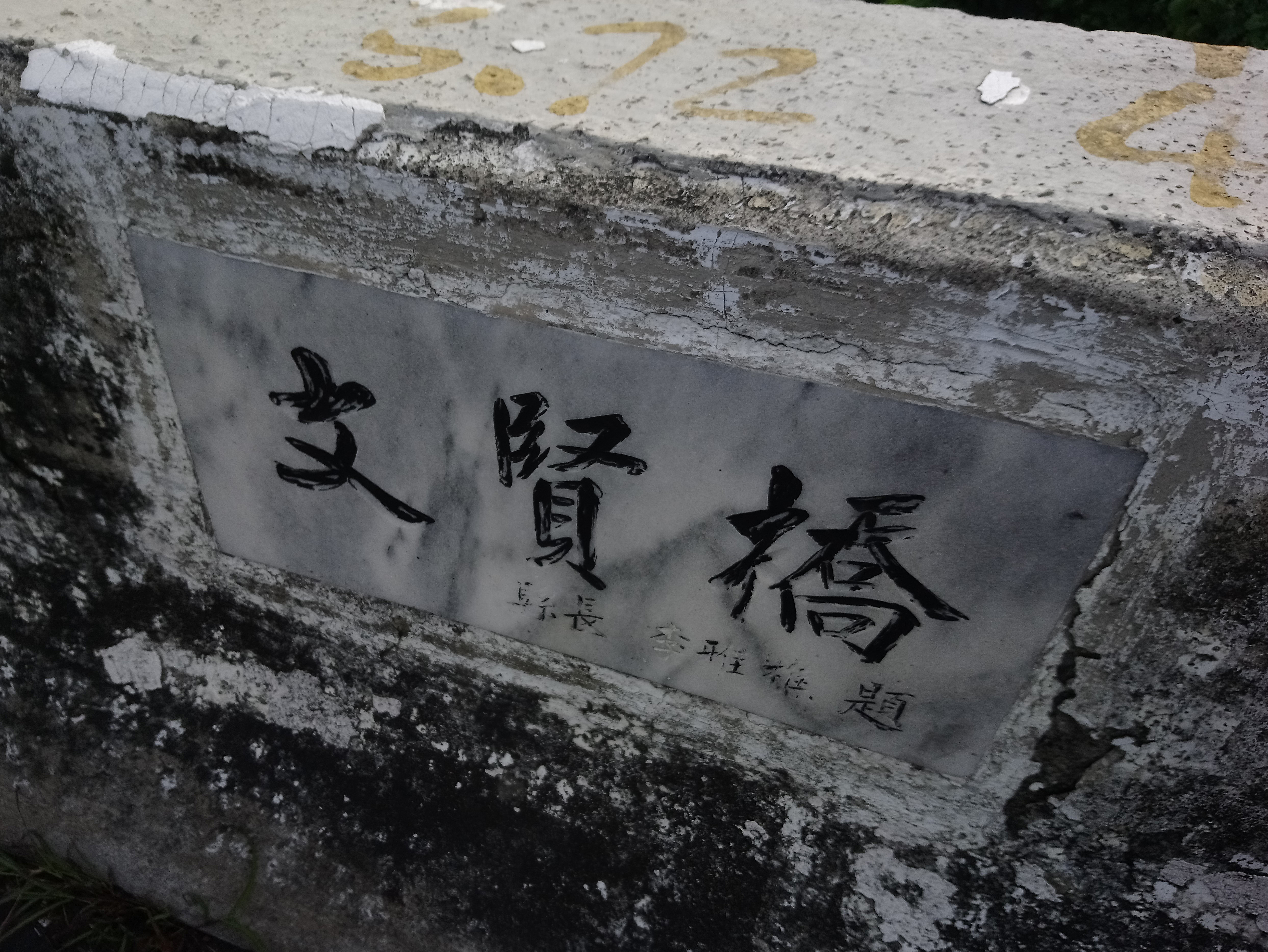 文賢橋上臺南縣縣長李雅樵所題鑲板,臺南市仁德區成功里